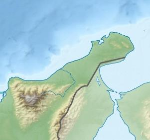 Rio Rancheria